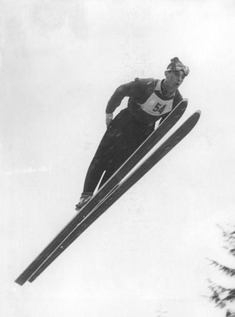 Zentralbild Löwe 24.2.1958 Deutsche Skimeisterschaften in Altenberg beendet In Altenberg wurden am Sonntag, dem 23.2.1956, die Nordischen Deutschen Skimeisterschaften mit dem Spezialsprunglauf beendet. Deutscher Meister im Springen wurde Harry Glass (Dynamo Klingenthal) vor Helmut Recknagel (Motor Zella-Mehlis) und Titelverteidiger Werner Lesser (Dynamo Brotterode). UBz: Der Deutsche Meister Harry Glass in Aktion.